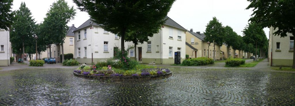 Siedlung Flöz Dickebank Autostitch